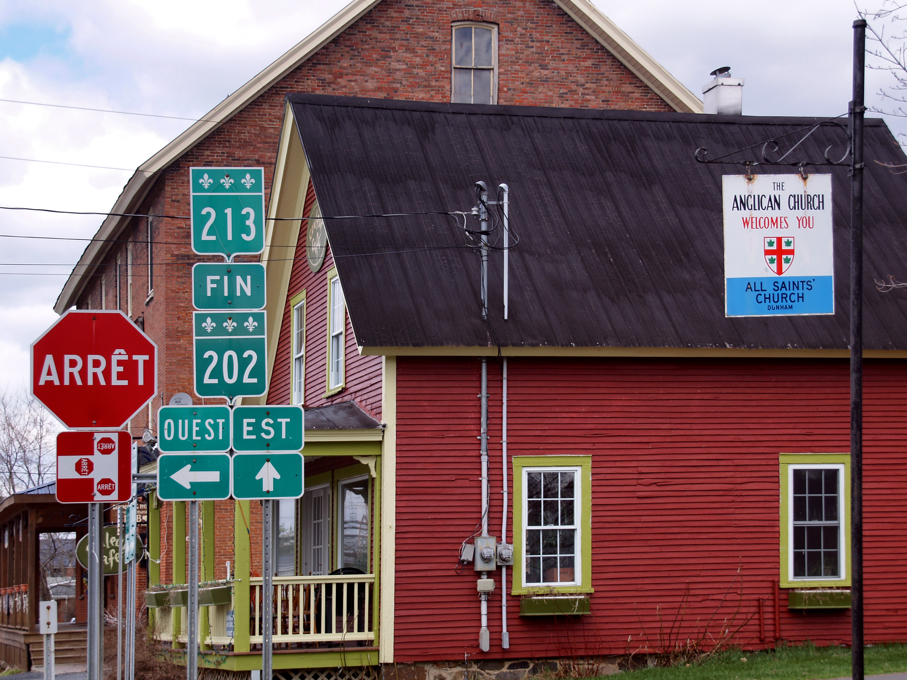 Dunham, Montérégie (Québec) - Jonction des routes 202 et 213 au centre ville